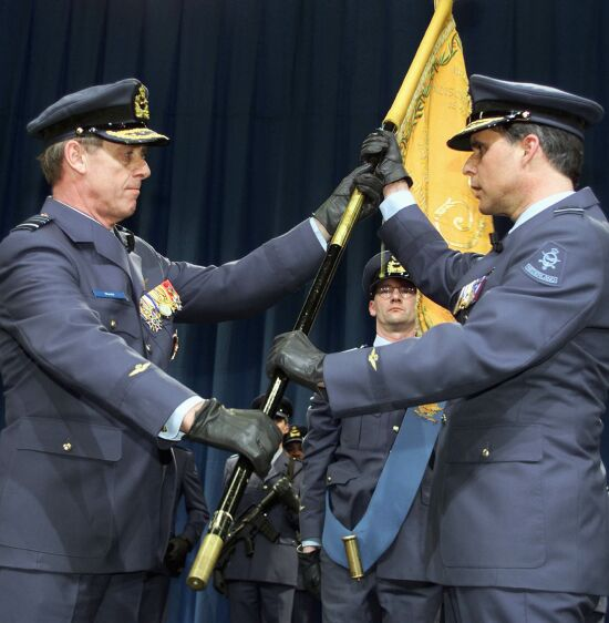 Overdracht van het commando over de Koninklijke Luchtmacht